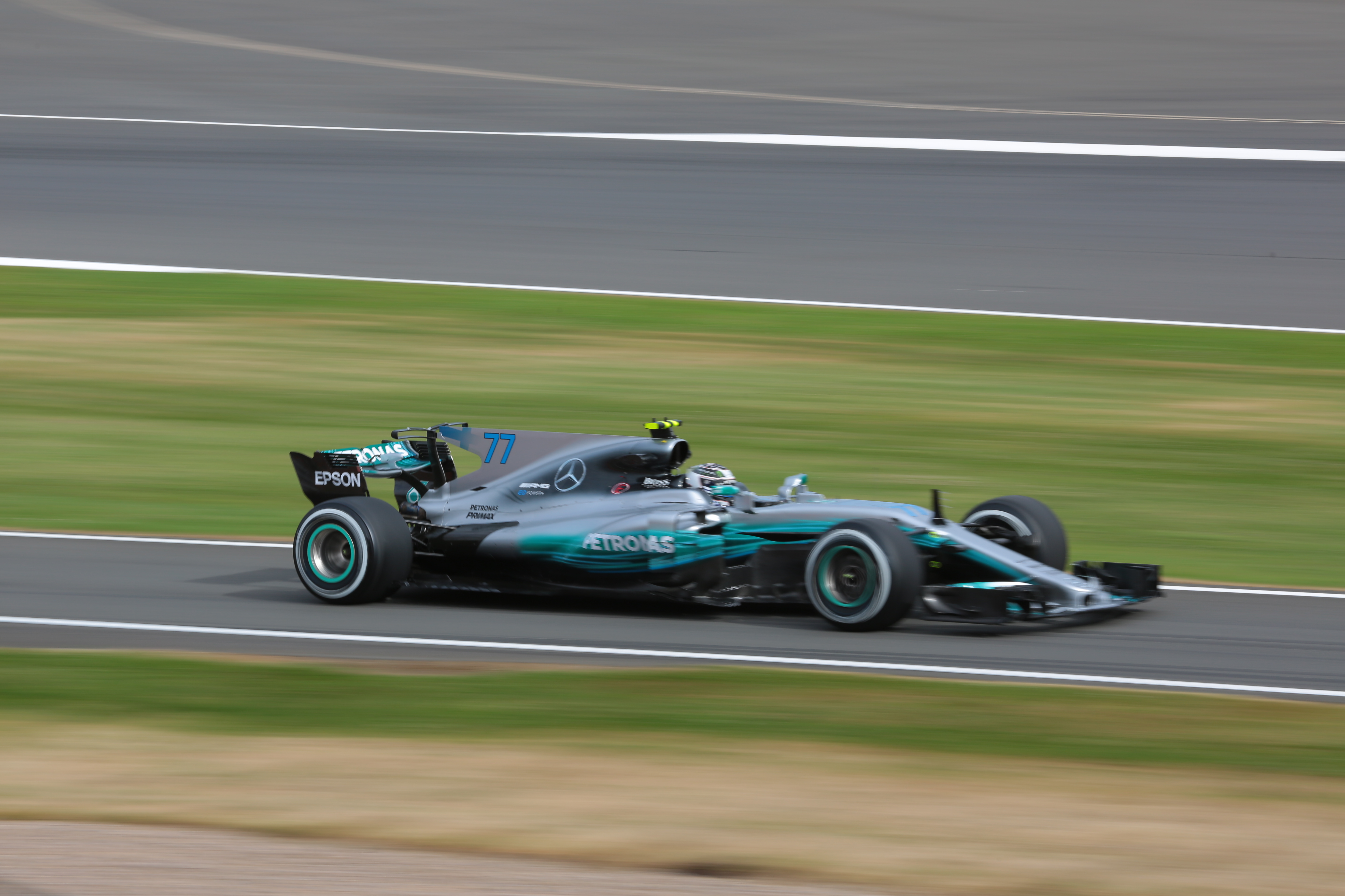 f1